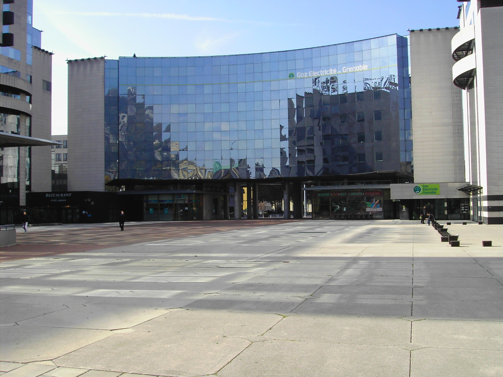 immeuble G.E.G europole grenoble